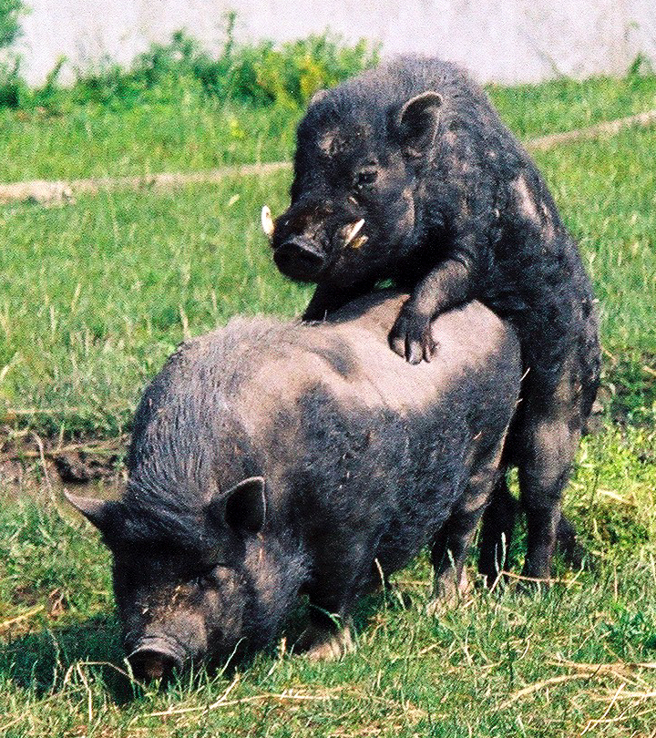 Świnia_wietnamska - para